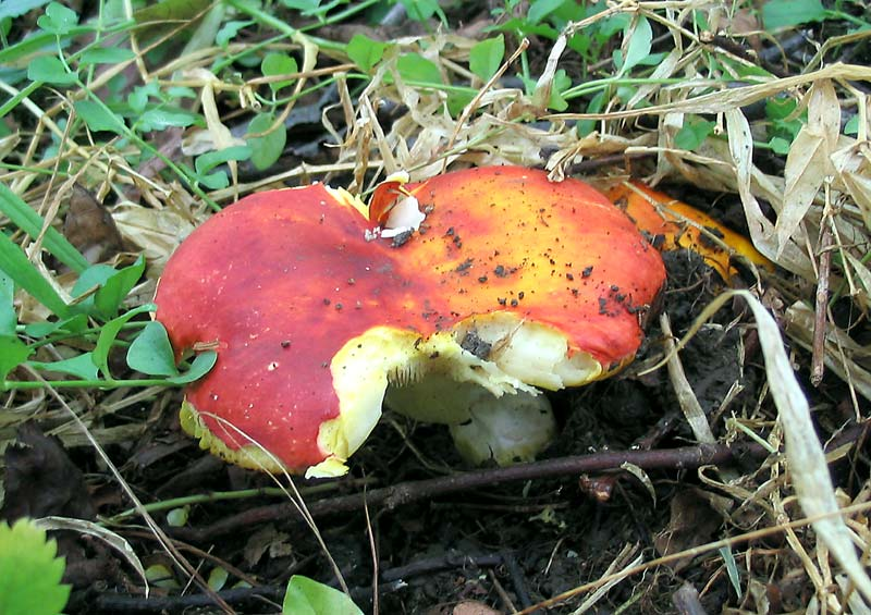 Aranyos galambgomba (Russula aurea, vagy Russula aurata) ehető gombafaj